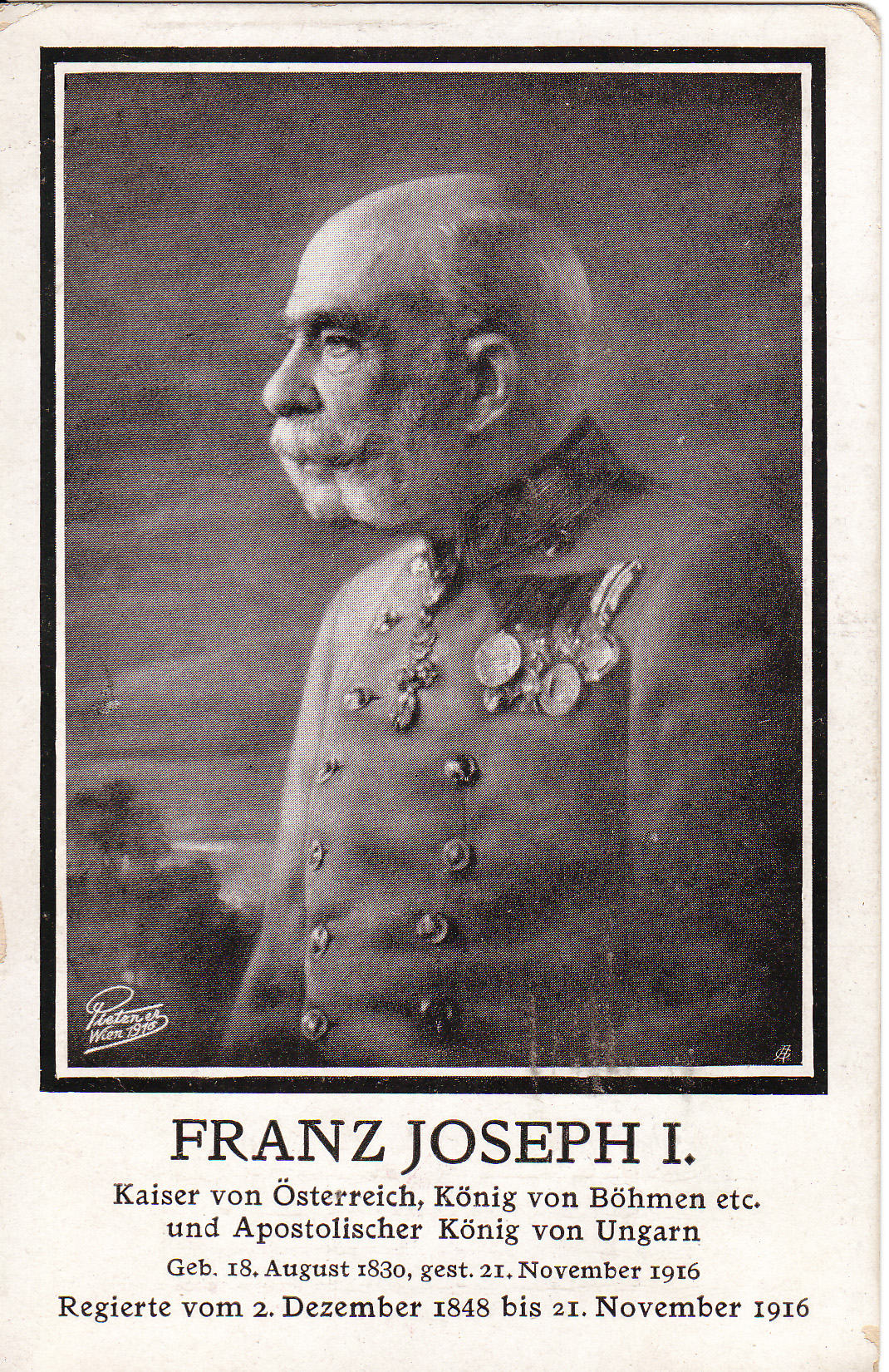 Kartica izdana ob smrti cesarja Franca Jožefa, zasebna last: M. Č.